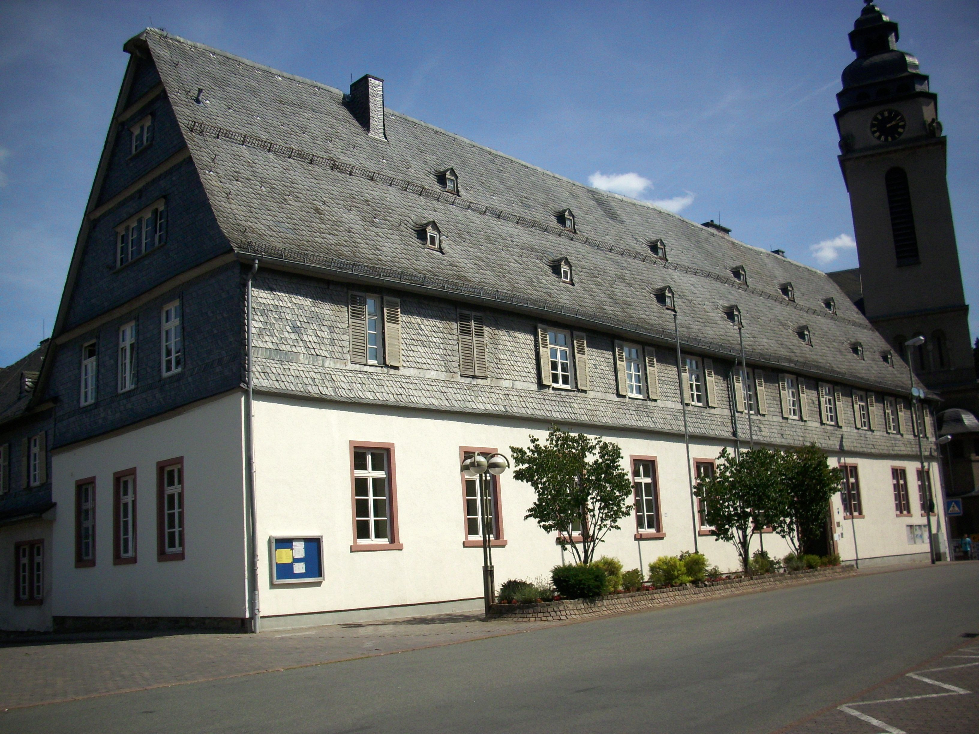 Das Gerichtsgebäude ist das denkmalgeschützte Rotenburger Schlößchen, Am Kurpark 12. Das Haus wurde 1602 für Landgraf Moritz von Hessen-Kassel erbaut. Dessen Sohn Hermann aus zweiter Ehe erhielt als Erbe die teilsouveräne Landgrafschaft Hessen-Rotenburg, zu der auch Schwalbach gehörte. Daraus leitet sich der Name des Schlösschens ab. 160 Jahre lang blieb das Gebäude im Eigentum der Linie Hessen-Rotenburg. Seit 1729 war das Schloss Sitz des Amtes Hohenstein, dann des herzoglich nassauischen Amtes Langen-Schwalbach, des Justizamtes und der Landoberschultheißerei; Landratsamt und Zollamt und heute Amtsgericht. Es handelt sich um eine vierseitig geschlossene Anlage um einen Innenhof. Der langgestreckte Hauptbau mit verschiefertem Fachwerkobergeschoss hat ein hohes Satteldach mit kleinen Gauben. Zur Hofseite befinden sich zwei offene Laubengänge auf Holzstützen mit geschnitzten Kopfbändern und eine barocke Tür. Die Obergeschosszone auch der Wirtschaftsgebäude ist mit reizvollem Zierfachwerk versehen. Das Zwerchhaus war früher mit einer Ladeluke versehen. Das Treppentürmchen ist von einem Haubendach gekrönt. Ursprünglich gehörten zwei herrschaftliche Wachthäuser, Waschhaus, Amtsdienerwohnung, Scheuer, Chaisen-Remise, Gärten und Wiesen zum Anwesen.